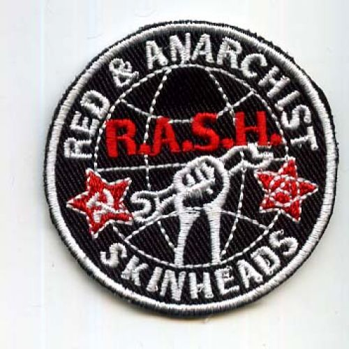 Одно из изображений RASH